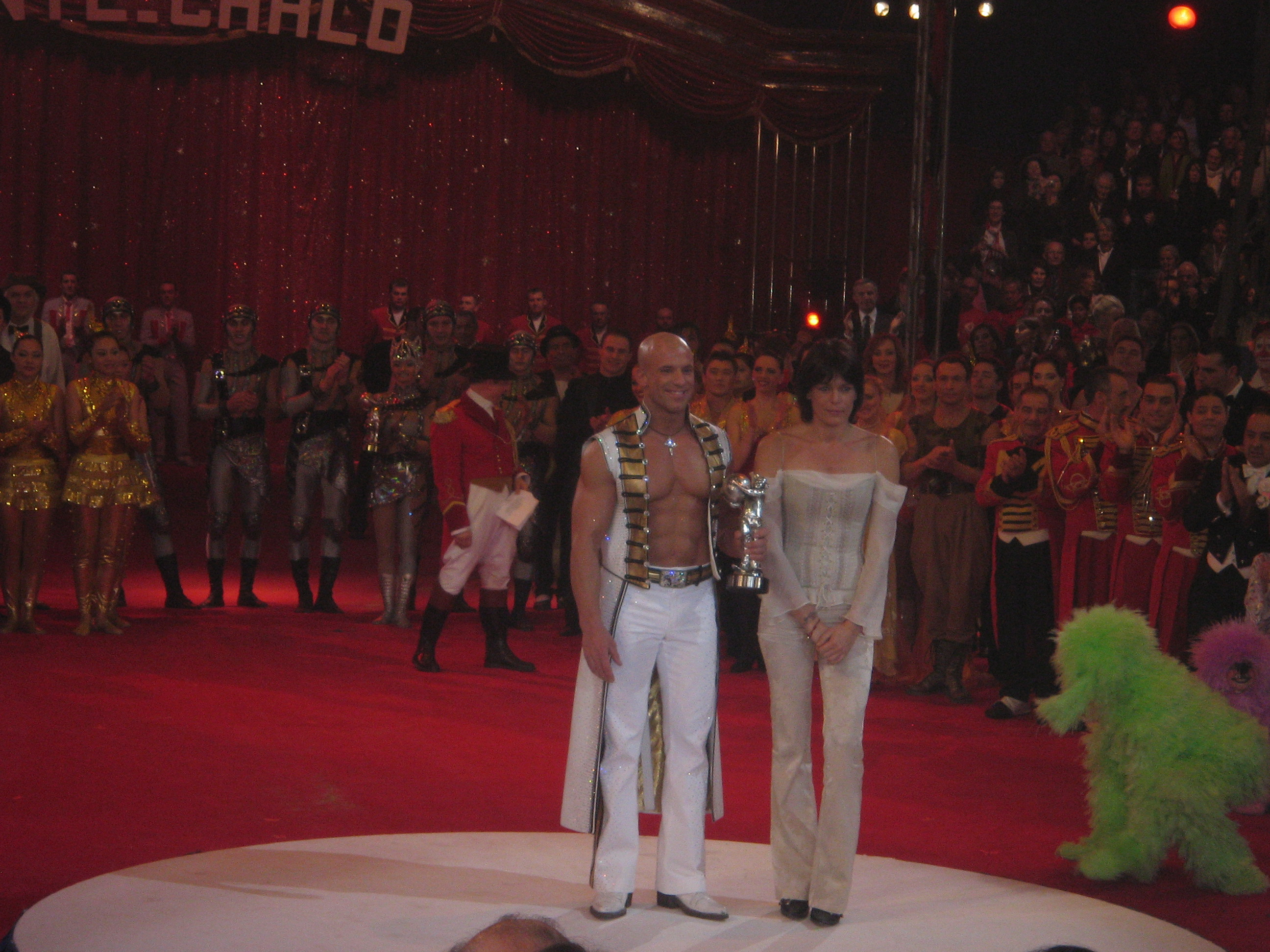 Encho Keryazov mit Prinzessin Stephanie von Monaco bei der Verleihung des "Silbernen Clowns" anlässlich des Zirkusfestivals 2007